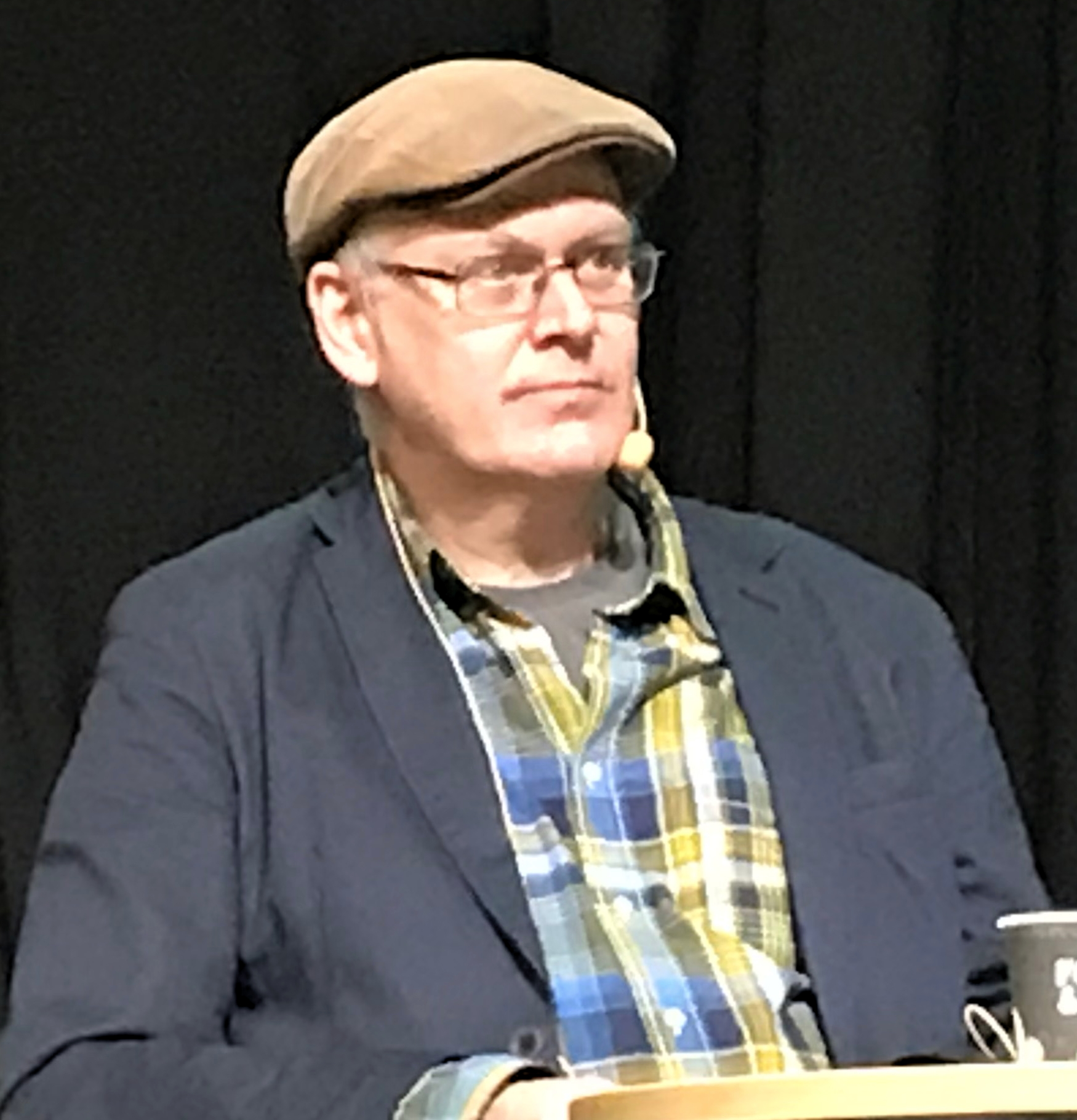 Peter Törnqvist, på Bokmässan i Göteborg 2019.